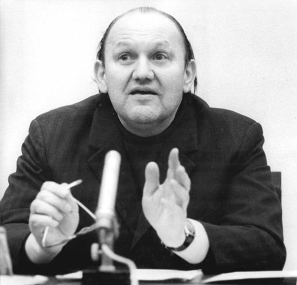 ADN-ZB Katschorowski 23.3.73 Berlin: Zur Ergänzung Ihres Porträtarchives. Der Schriftsteller Franz Fühmann.